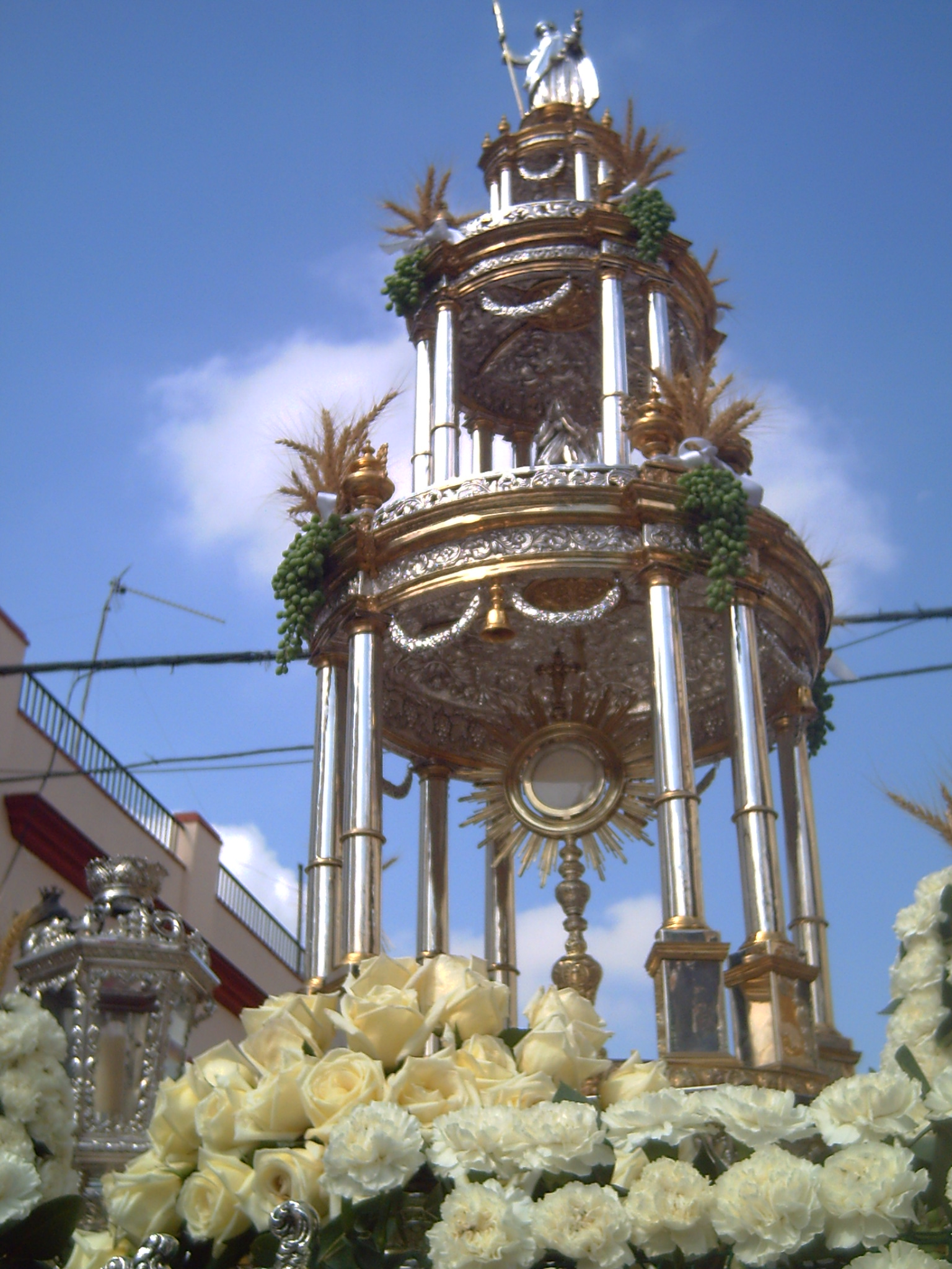 fotografía de la Custodia del Santísimo Sacramento del Viso del Alcor